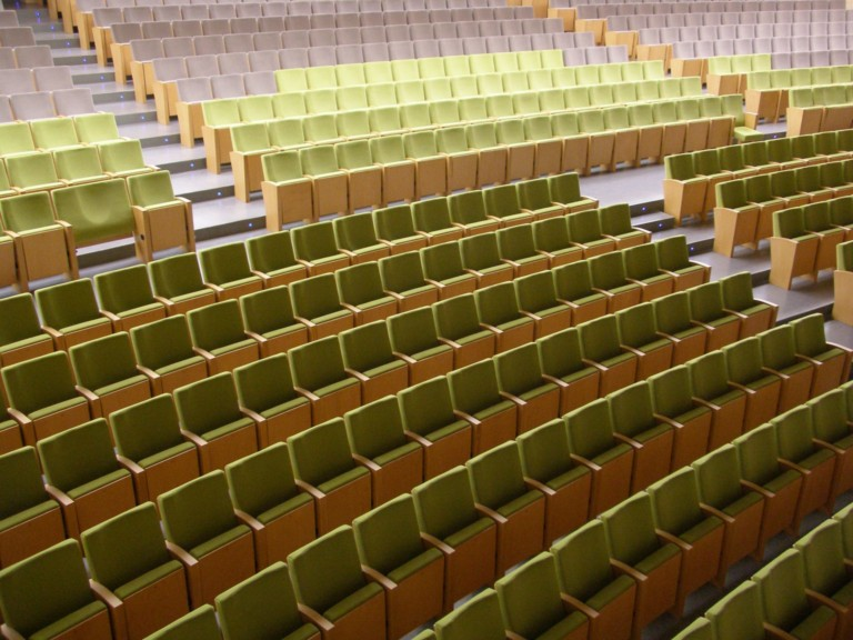 Leidor antzokia barrutik